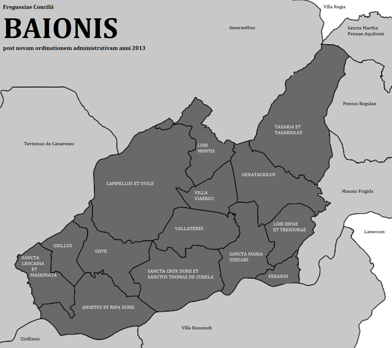 Freguesiae Baionis